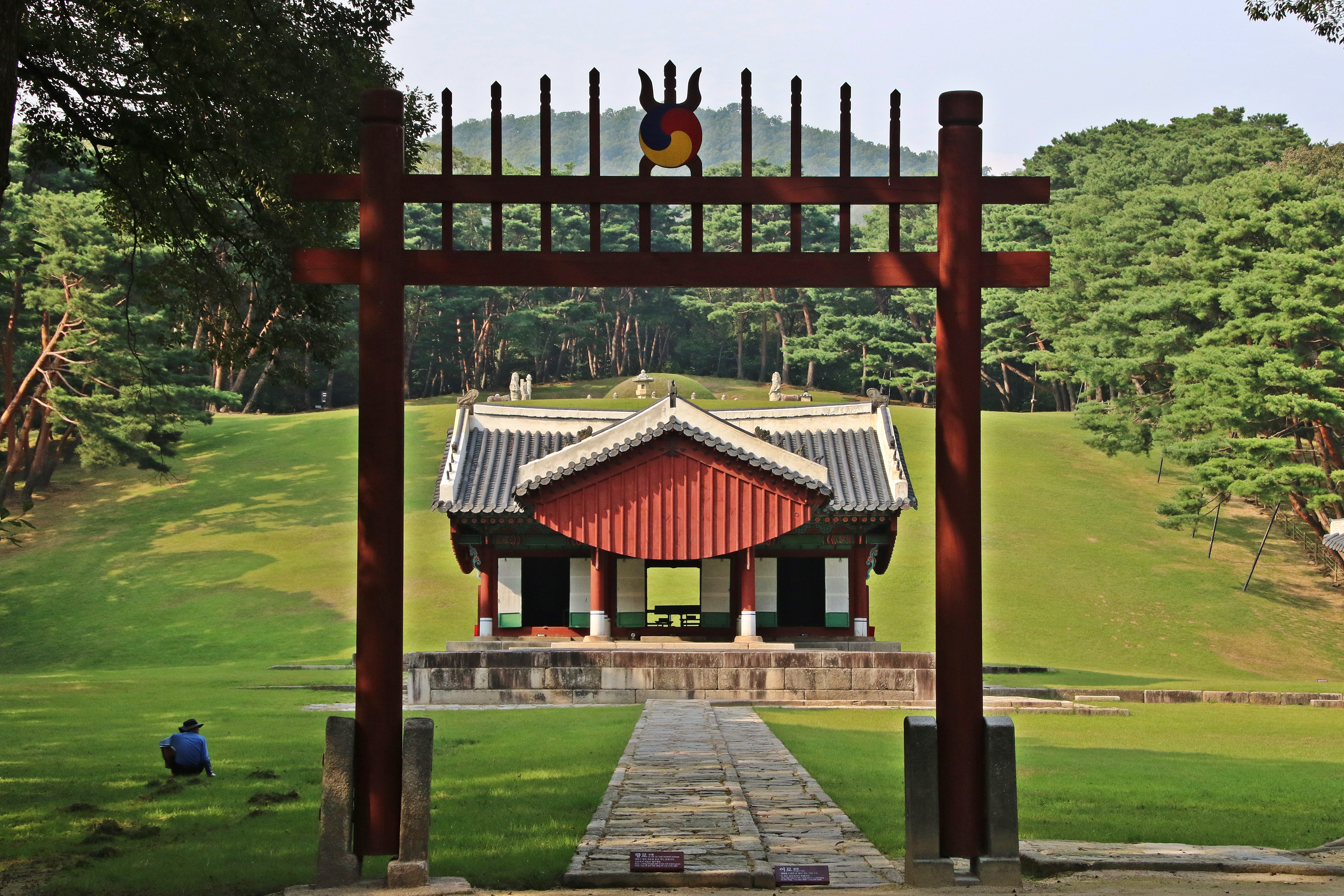 The Red Gate with Spiked Top(홍살문). It has a means to protect a sacred place.